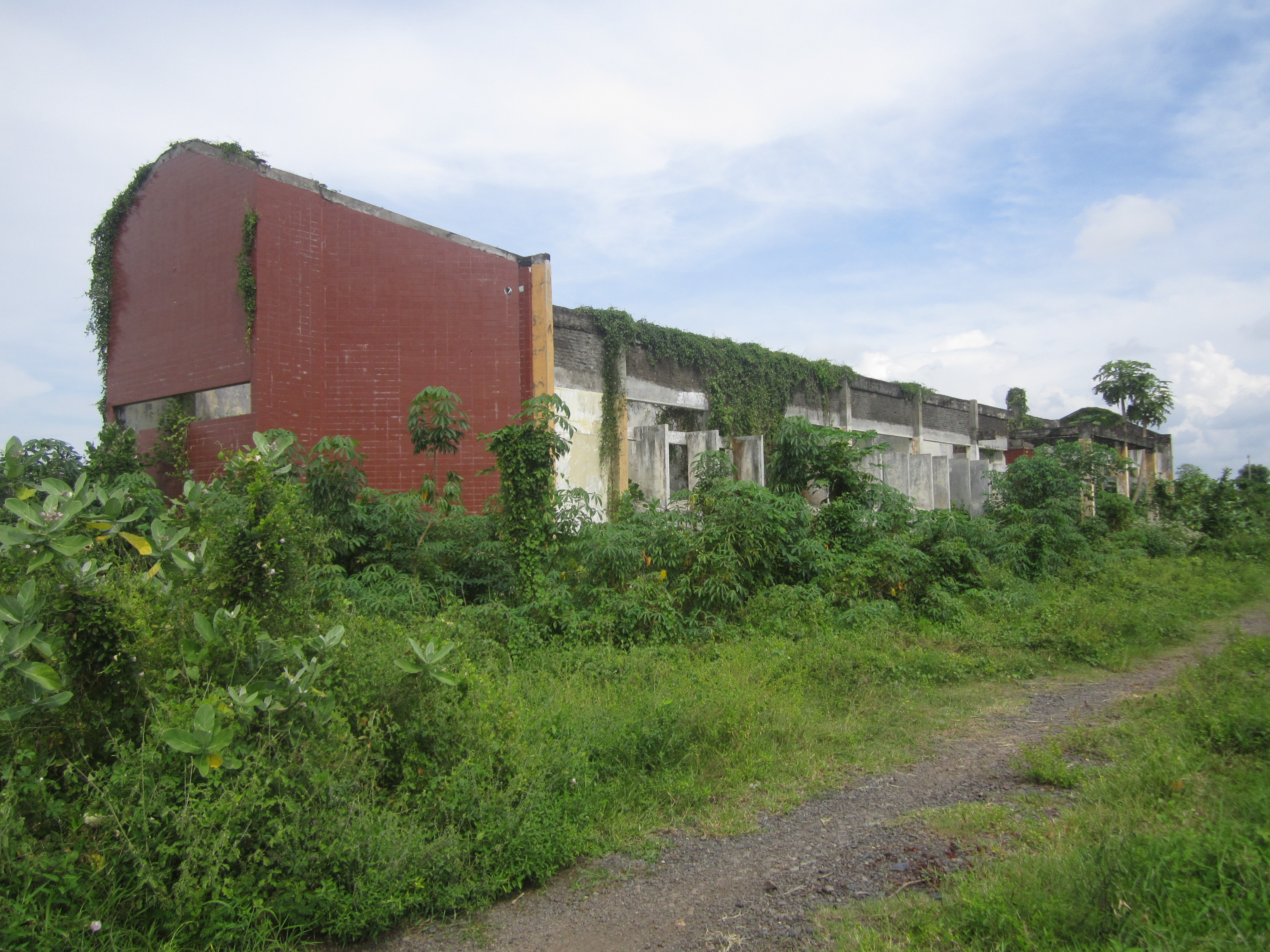 Stasiun Kabat Banyuwangi